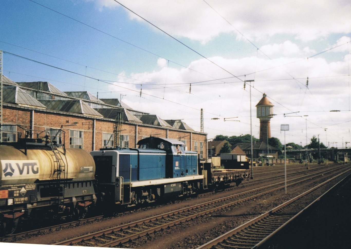 Diesellok der Baureihe 291 in blau-beige in Lingen/Ems beim Rangierdienst. Aufnahme aus einem Zugfenster.